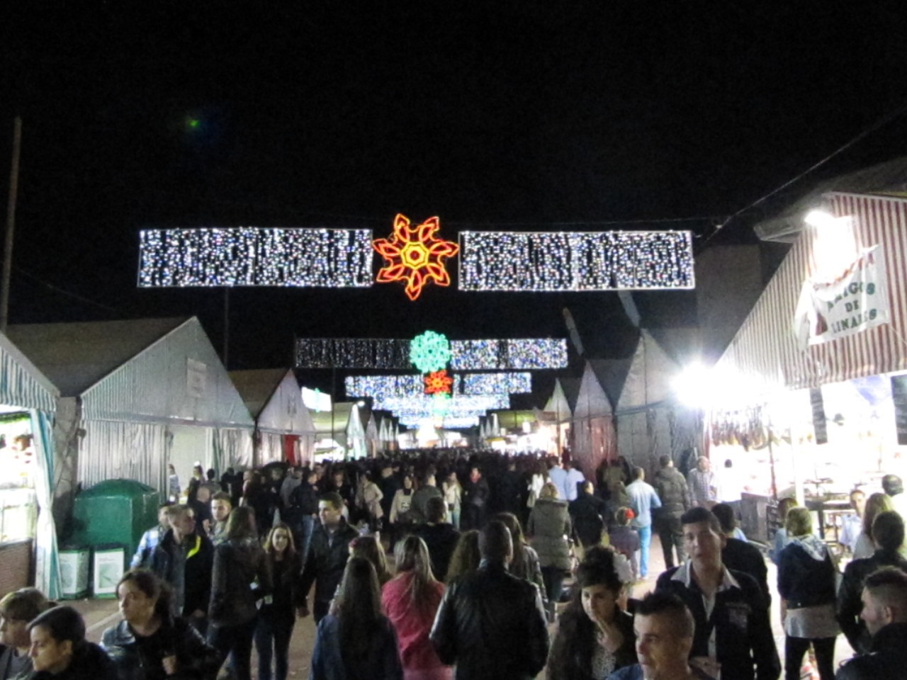 Una de las calles del "Real de la Feria" de Barcelona de noche.